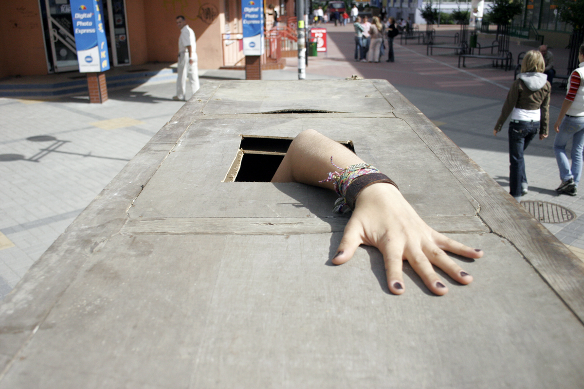 Akcja teatralna "Sza-fy" Teatru Form Czarno-Białych "Plama"' z Suwałk